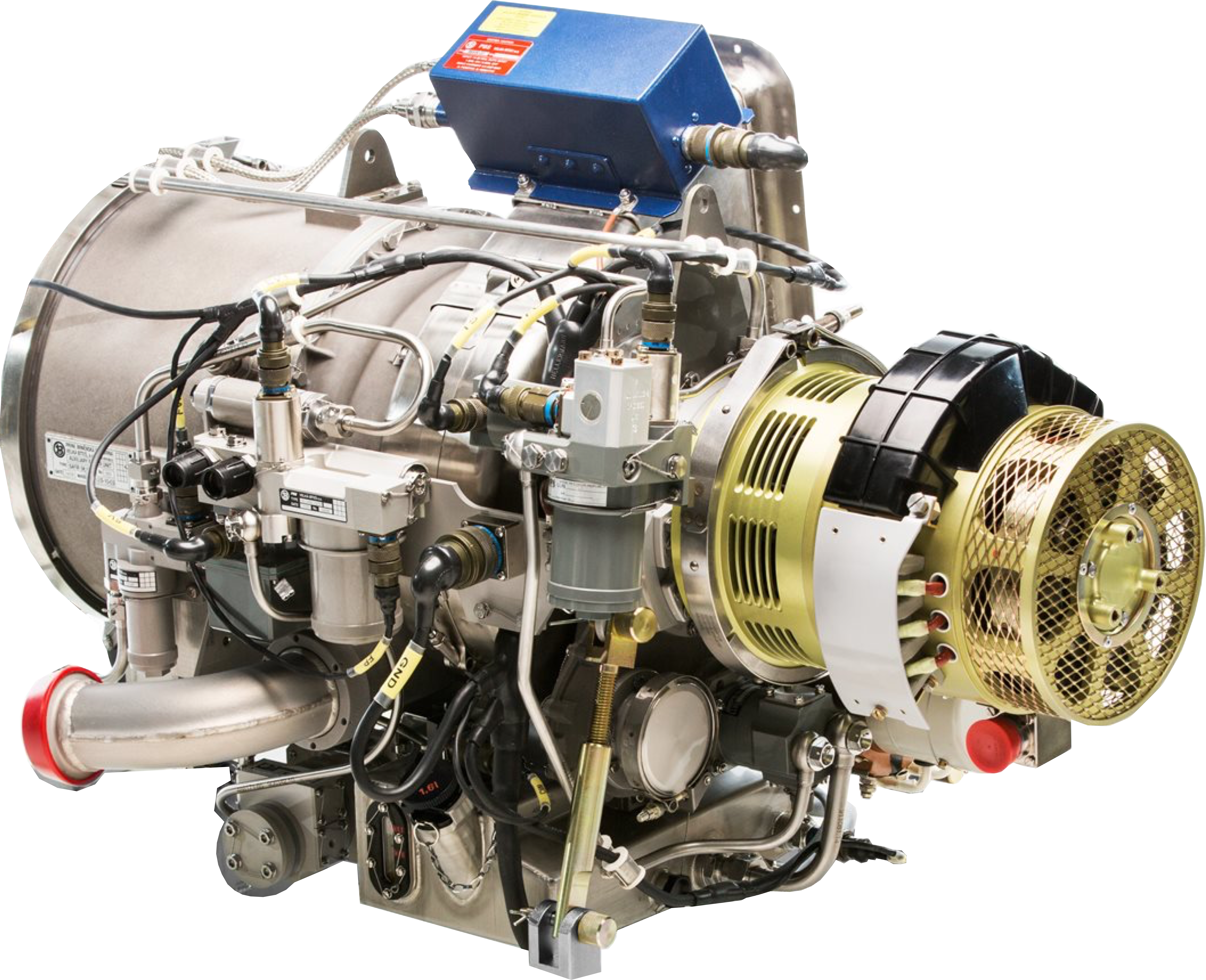 Safir MI bez rámu